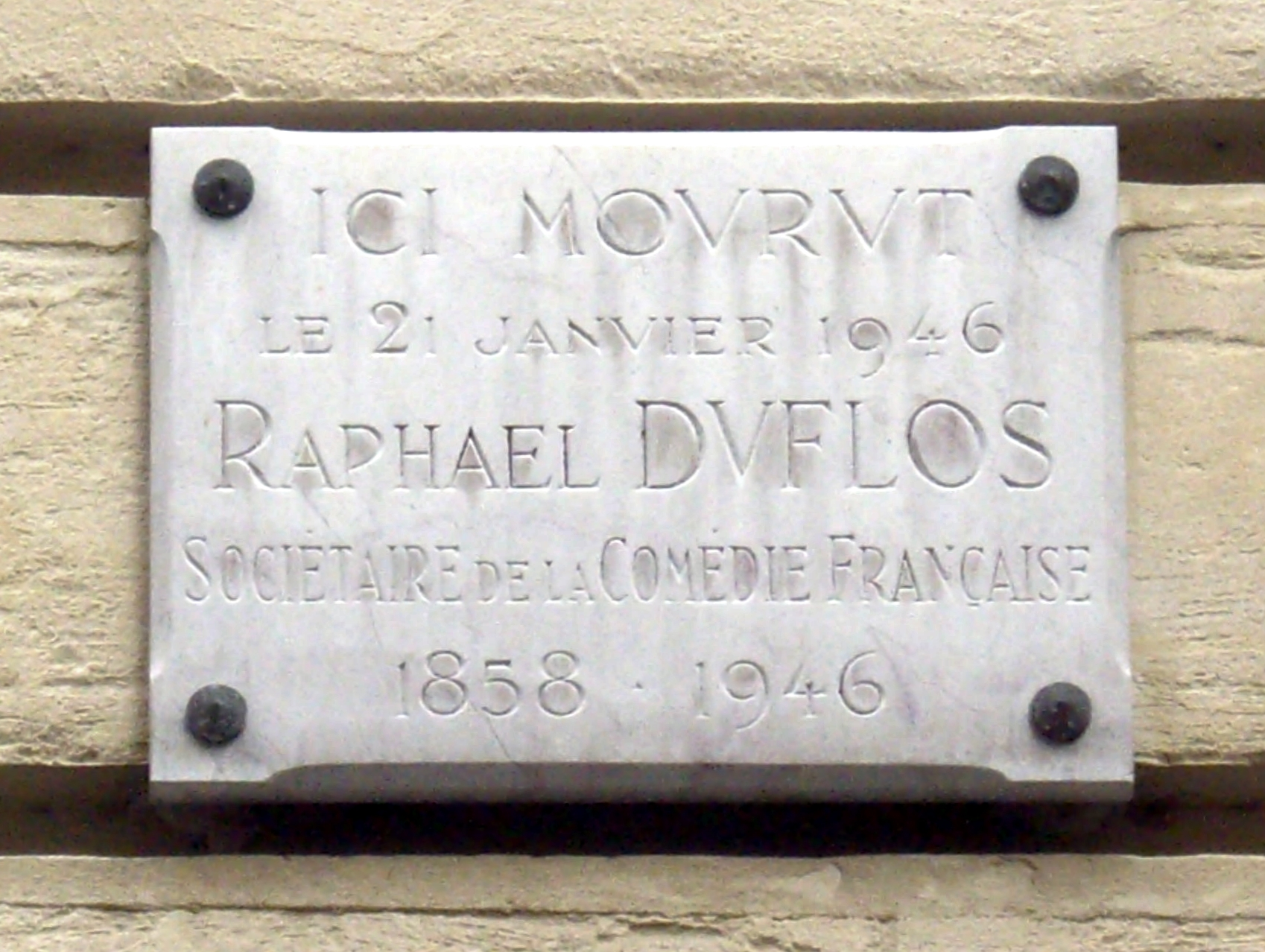 Plaque apposée au n° 12 de la rue Cambacérès, Paris 8e, où mourut l'acteur Raphaël Duflos (1858-1946), sociétaire de la Comédie-Française.